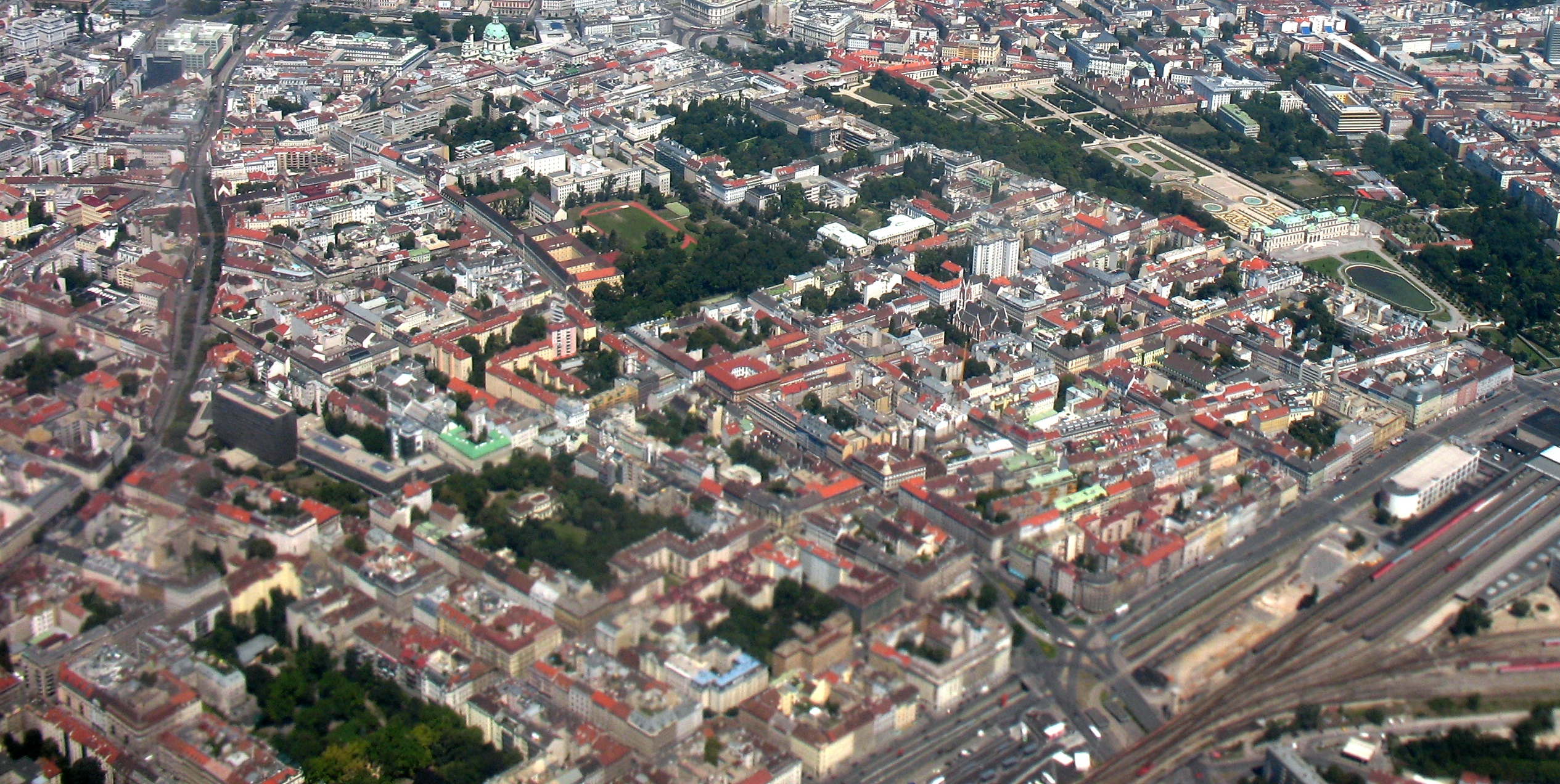 Vídeň, 4. okres (Weiden) od jihu z letadla